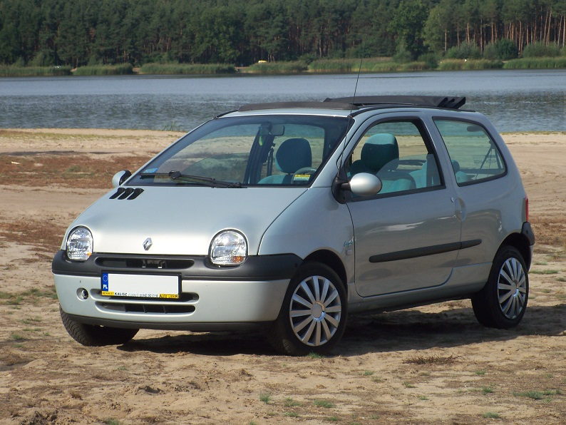 Renault Twingo 2005